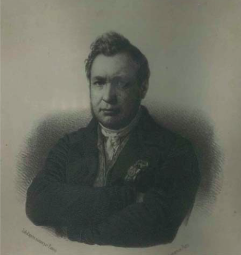 Yves Gilart de Keranflec'h